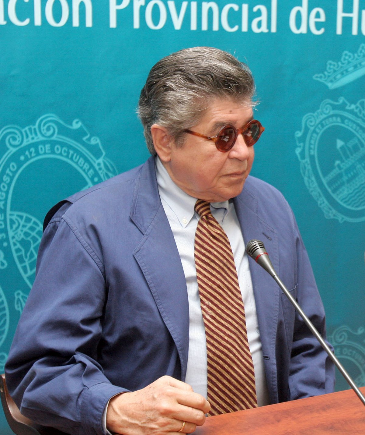 Conferencia del escritor peruano Alfredo Bryce Echenique , en el marco del IX Encuentro de las Artes y las Letras de Iberoamérica, auspiciado por la Universidad Internacional de Andalucía, y celebrado en Huelva el 24 de octubre de 2007. / Fuente: Universidad Internacional de Andalucía (Flichr) / IX Encuentro de las Artes y las Letras de Iberoamérica.